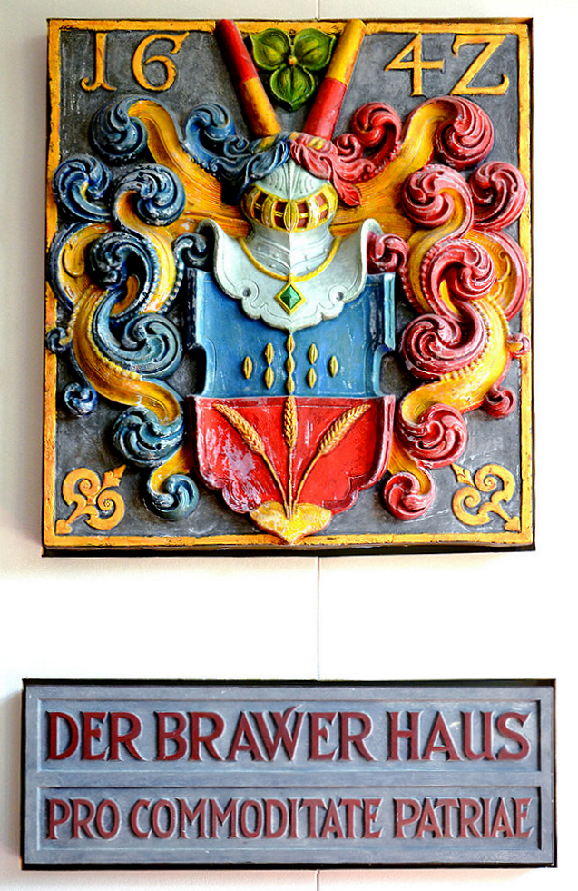 Der Brauergilde-Wappenstein der Stadt Hannover von 1642 wird dem Bildhauer Hans Nottelmann dem Jüngeren zugeschrieben und war ursprünglich an dem 1642 bis 1644 an dem im Auftrag des Rates der Stadt Hannover von den Unternehmer Johann Duve errichteten Brauergilde-Haus in der Osterstraße angebracht. Dort fand sich auch der Schriftzug „DER BRAWER HAUS / PRO COMMODITATE PATRIAE“ der später als Replik nachgebildet wurde. Die hier zu sehende Fotografie entstand mit freundlicher Genehmigung der Gilde Brauerei in der Eingangshalle von deren Verwaltungsgebäude an der Alten Döhrener Straße ...